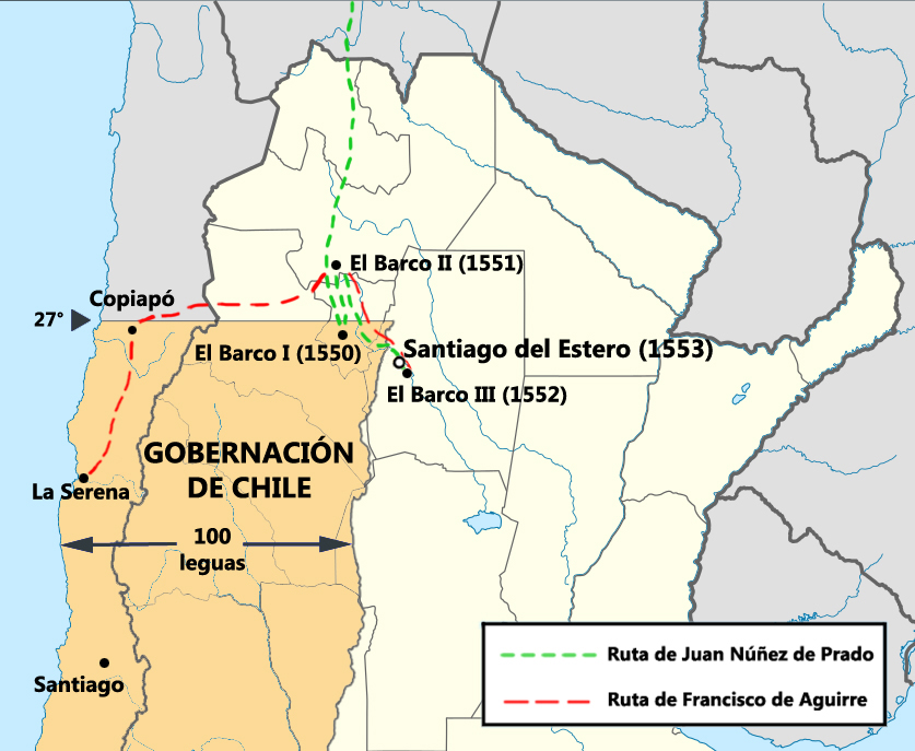 Mapa que describe la ruta de los fundadores Juán Núñez de Prado y Francisco de Aguirre para fundar las ciudades de El Barco y Santiago del Estero.